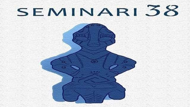 Logoja e Seminarit Ndërkombëtar për Gjuhën, Letërsinë dhe Kulturën Shqiptare 2019